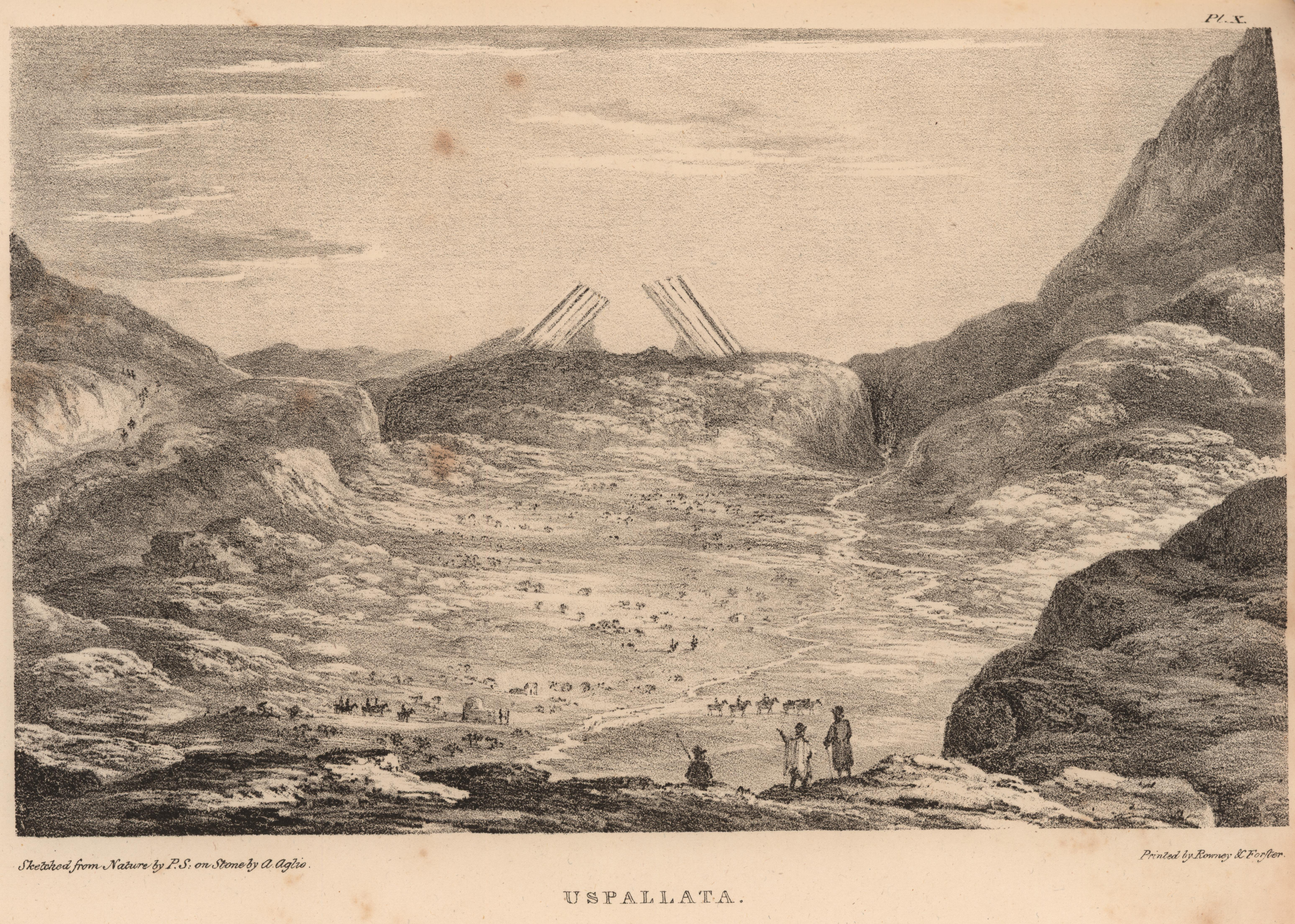 El paso de Uspallata, dibujo del viajero y filántropo inglés Peter Schmidtmeyer; litografía coloreada de Agostino Aglio; impresa por Rowney & Forster y publicada en el de libro de Schmidtmeyer Travels into Chile, over the Andes, in the years 1820 and 1821, London: Longman, Hurst, Rees, Orme, Brown and Green, 1824.